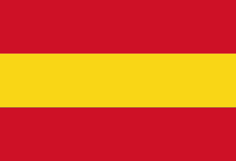 Bandera de la ciudad de Caazapá.